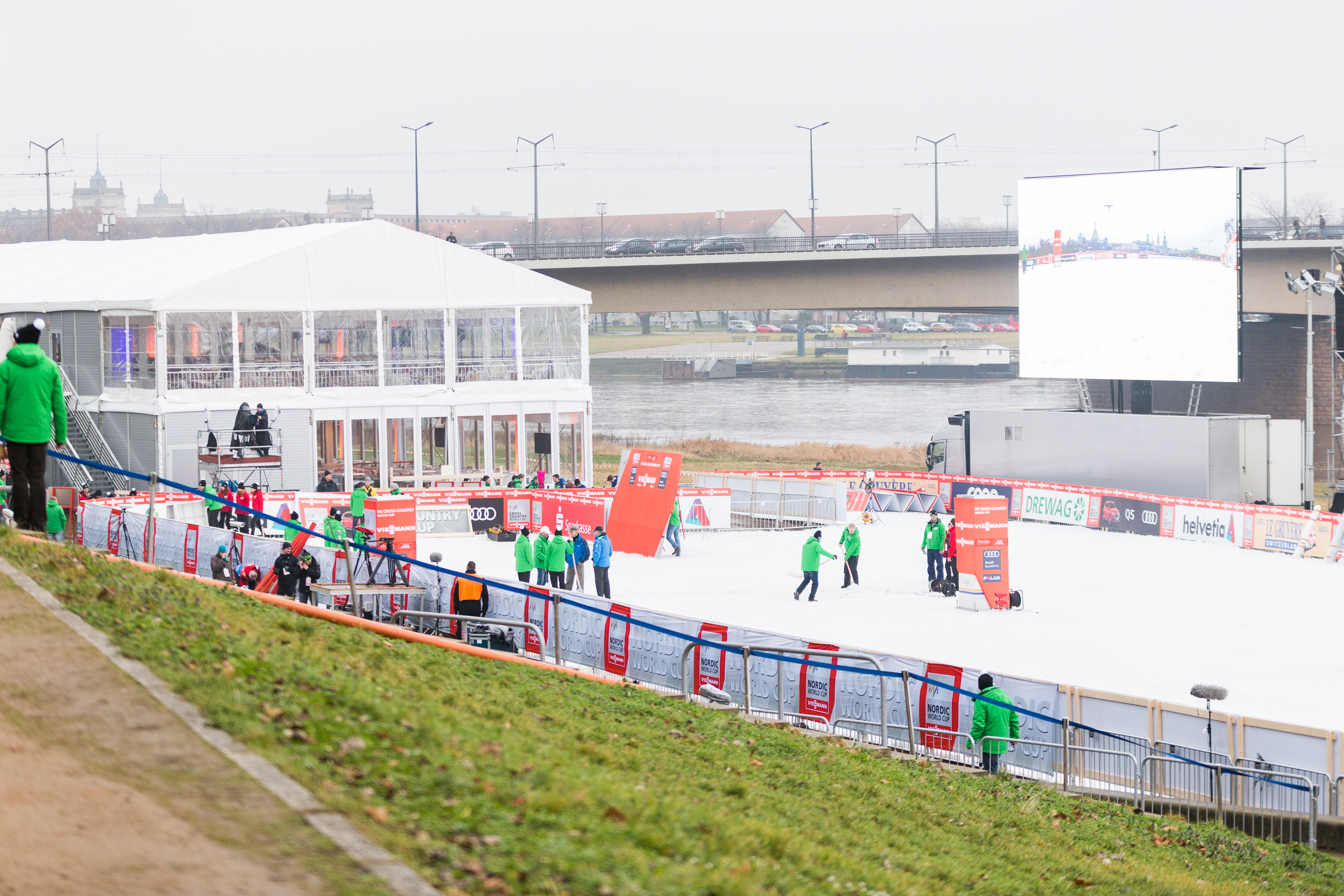 letzte Vorbereitungen in der Robotron-Ski-Arena